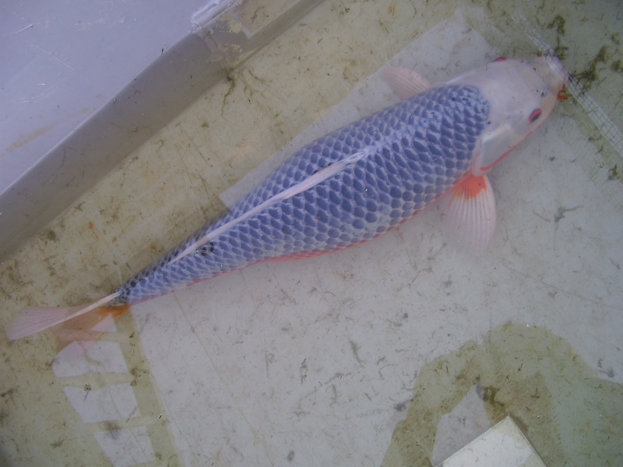 Koi asagi foto made by myself (Rob Hille)